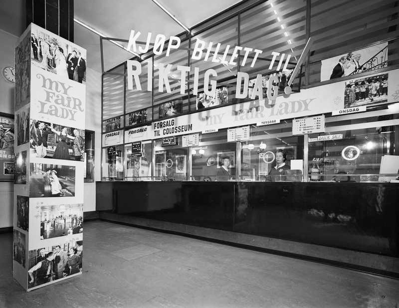 Kinosentralen, interiør, kinoplakater.